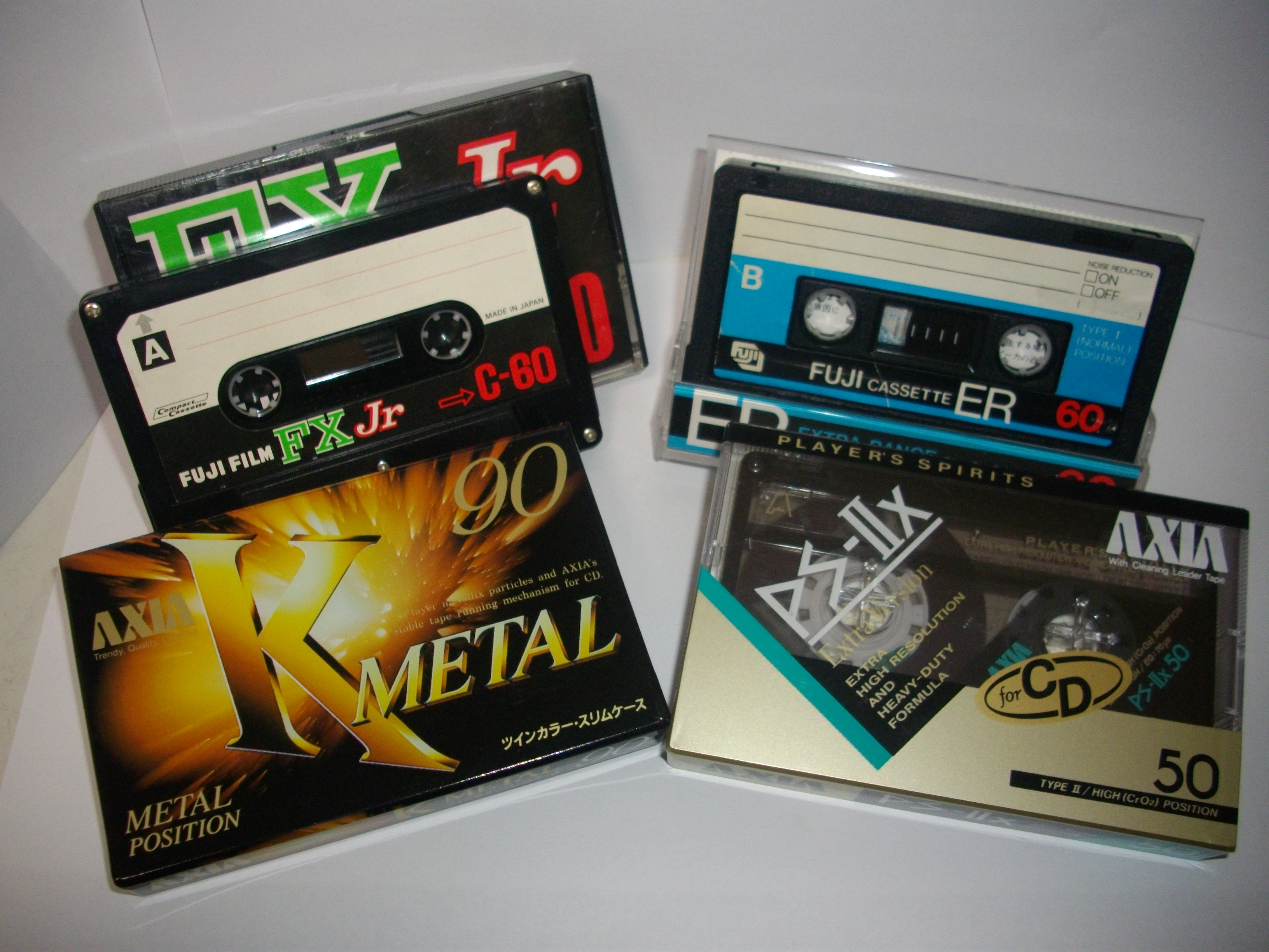 富士写真フイルム製のカセットテープ。